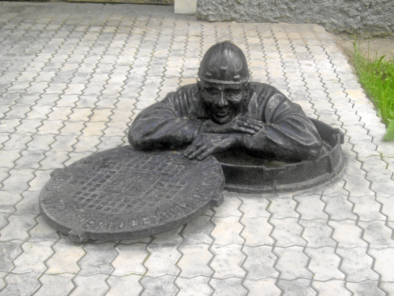 Памятник сантехнику перед офисом компании «Уралэнергосервискомплект» (Екатеринбург, Сибирский тракт, 2). На крышке люка надпись: «Уралэнергосервискомплект 1995». От омского памятника сантехнику Степанычу отличается выражением лица и отсутствием трубного ключа на крышке люка